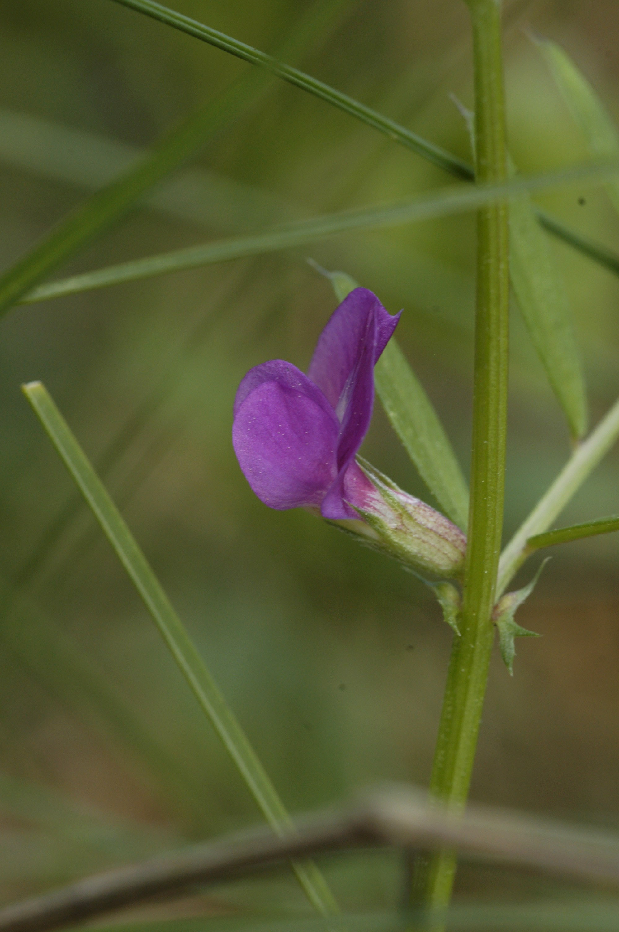 Schmalblättrige Wicke (Vicia angustifolia)